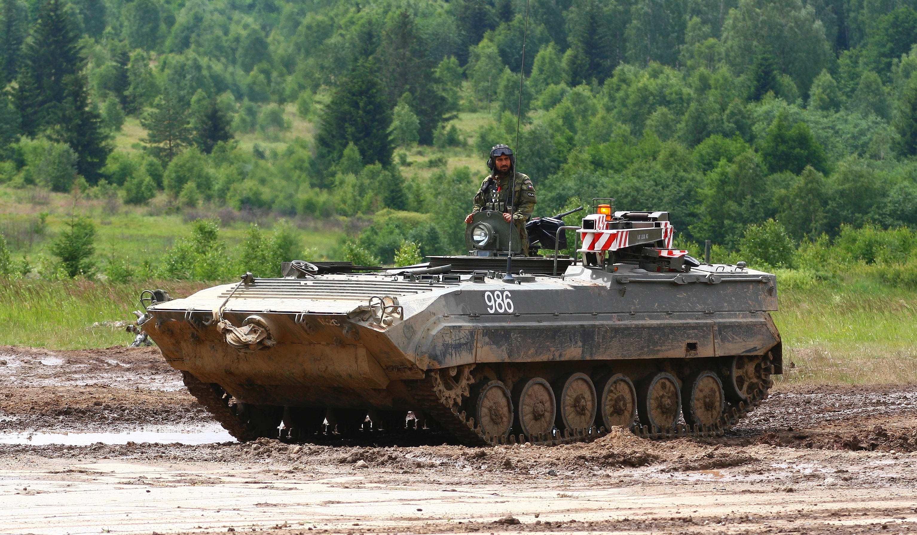 Vojenská technika zaznamenaná při dynamických ukázkách na Dni pozemního vojska BAHNA 2018, který pořádá Velitel společných sil a Nadace pozemního vojska AČR.